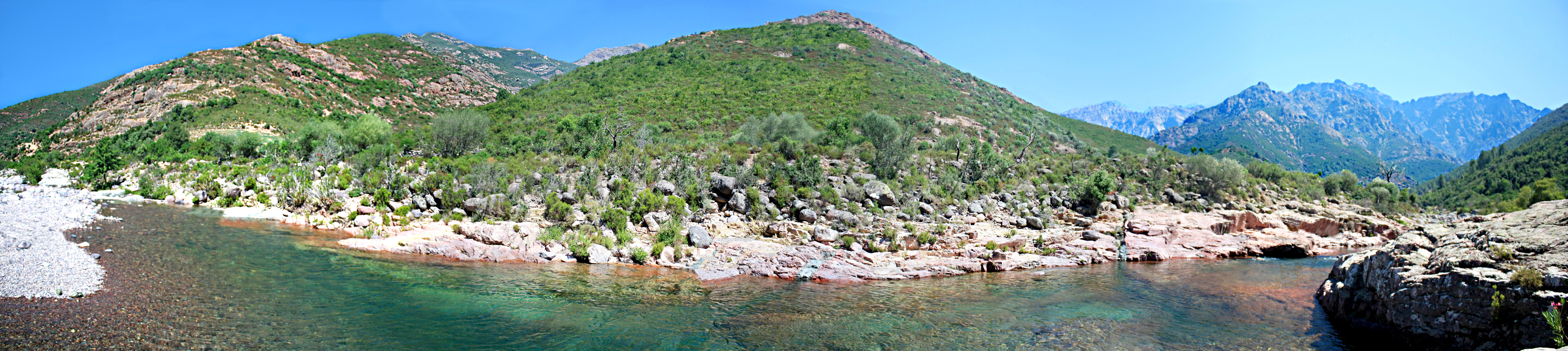 Le fango en été (Aout 2010)